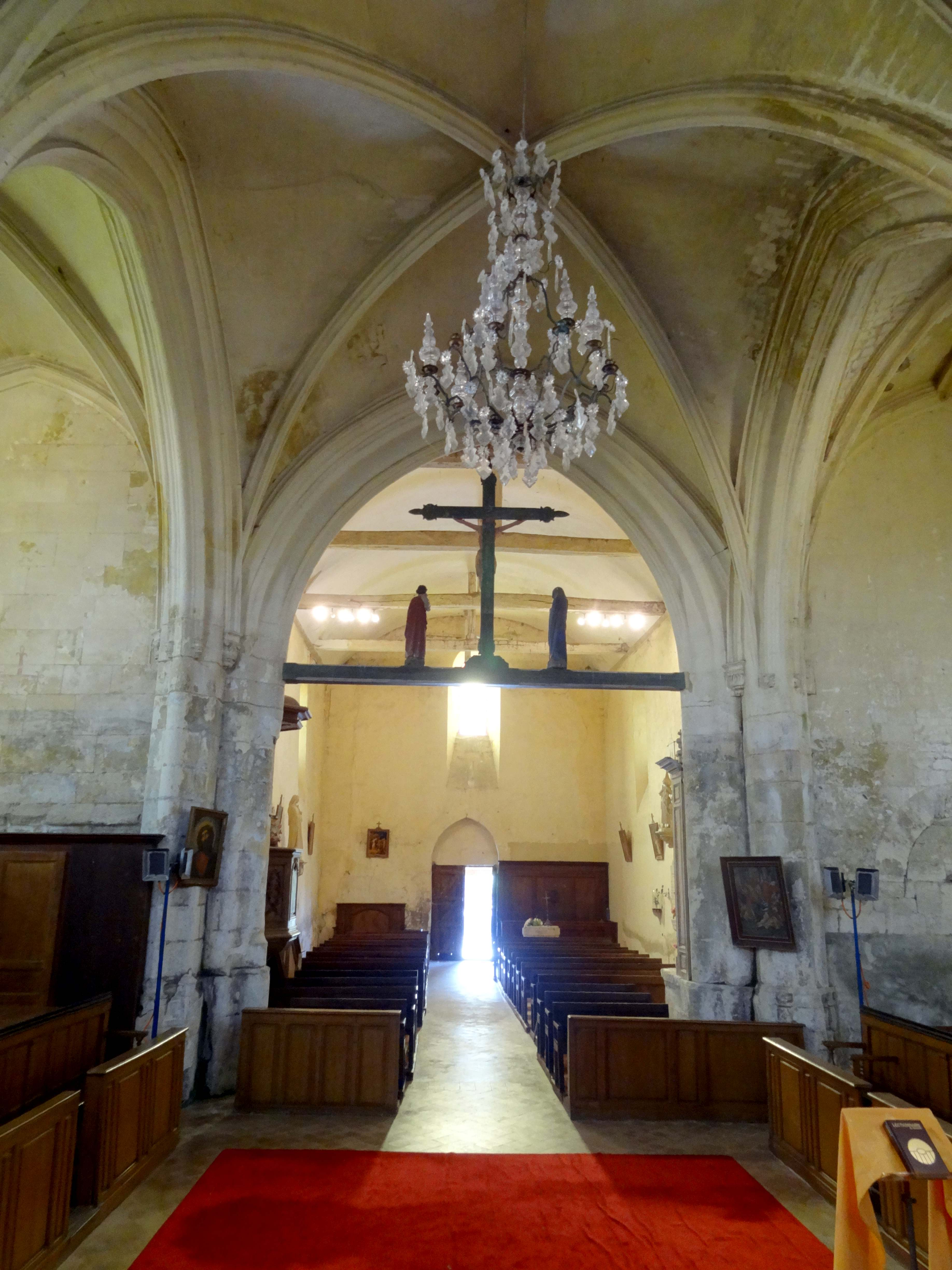 Intérieur de l'église - voir titre.